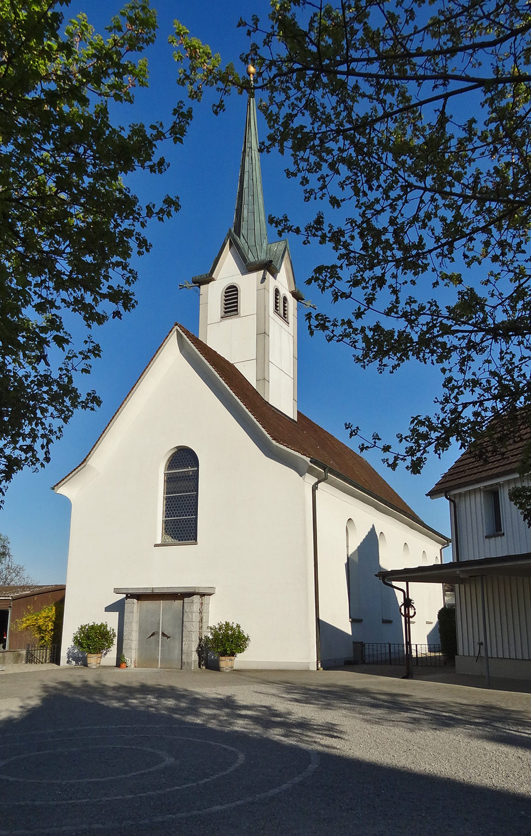 Catholic church, Altnau, Switzerland